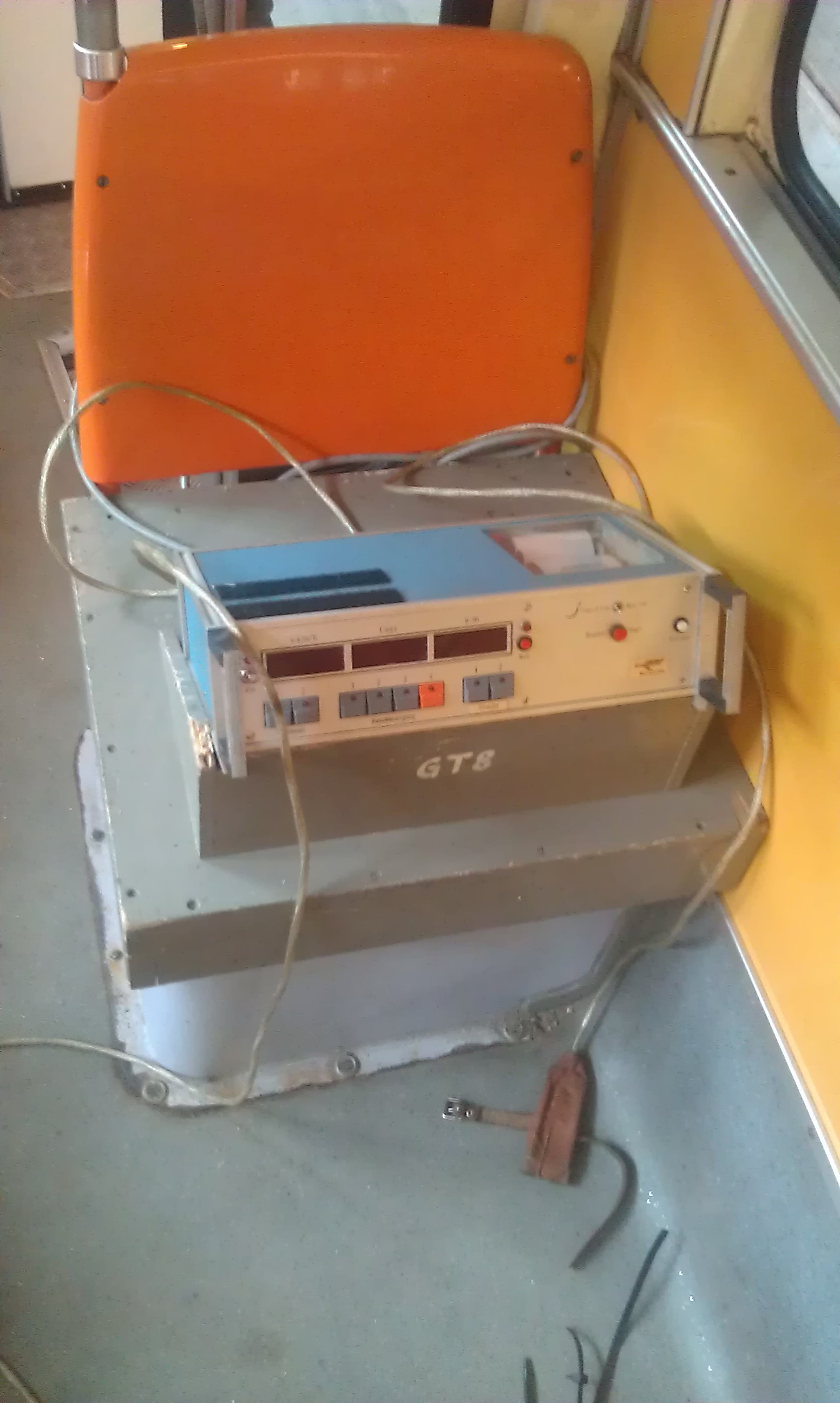 TW 806. Erster Einzelsitz für Messinstrument ausgebaut.